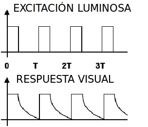 Respuesta visual del ojo ante un elemento de excitación luminosa.